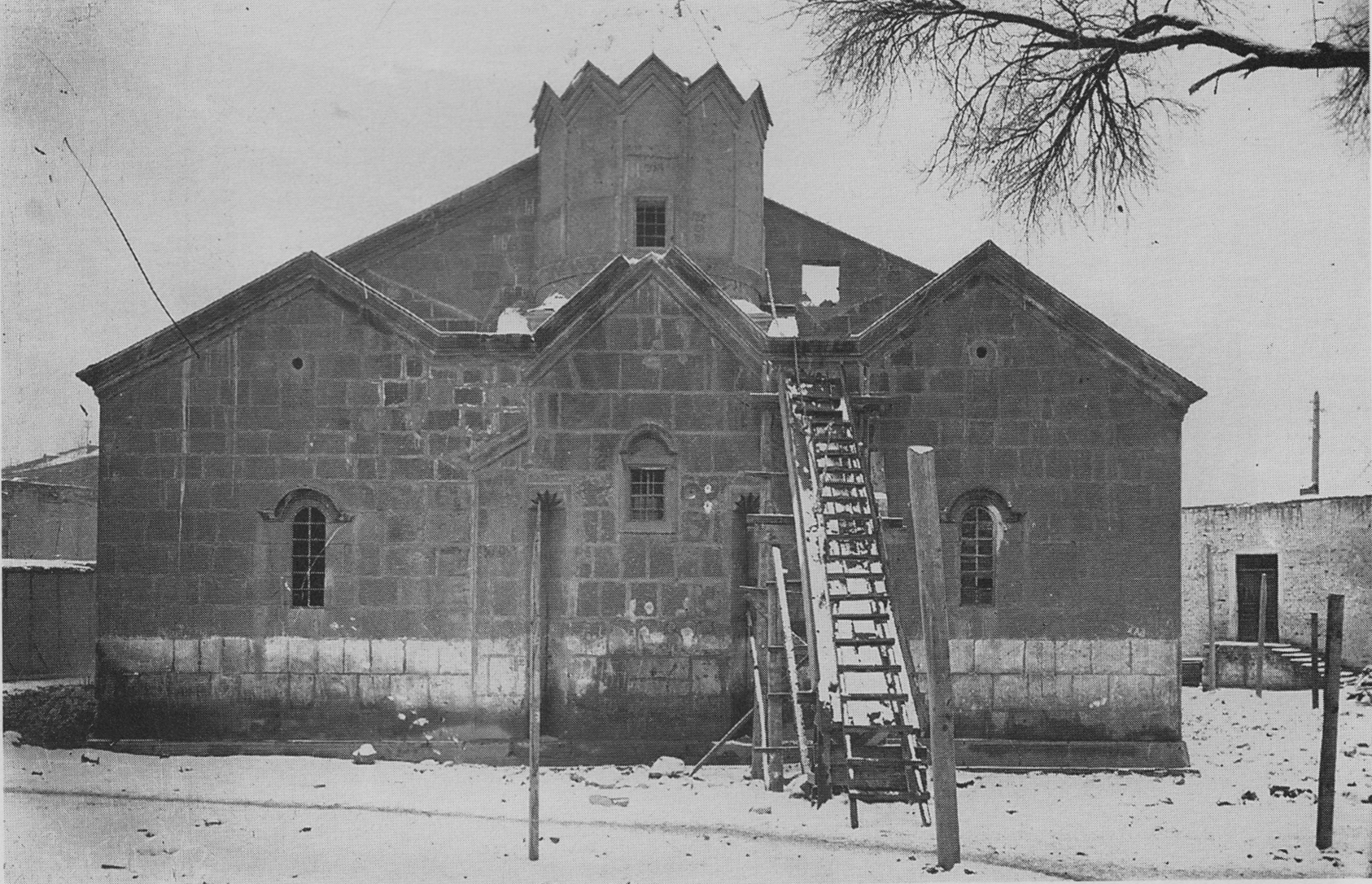 Երևանի Կաթողիկե եկեղեցին քանդելուց առաջ 1936